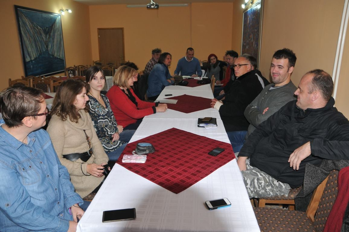 Оснивање фото клуба "Вишеград"